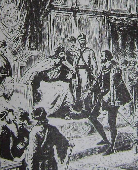 Фрагмент старинной гравюры. Ричард Ченслор на приёме у Ивана Грозного